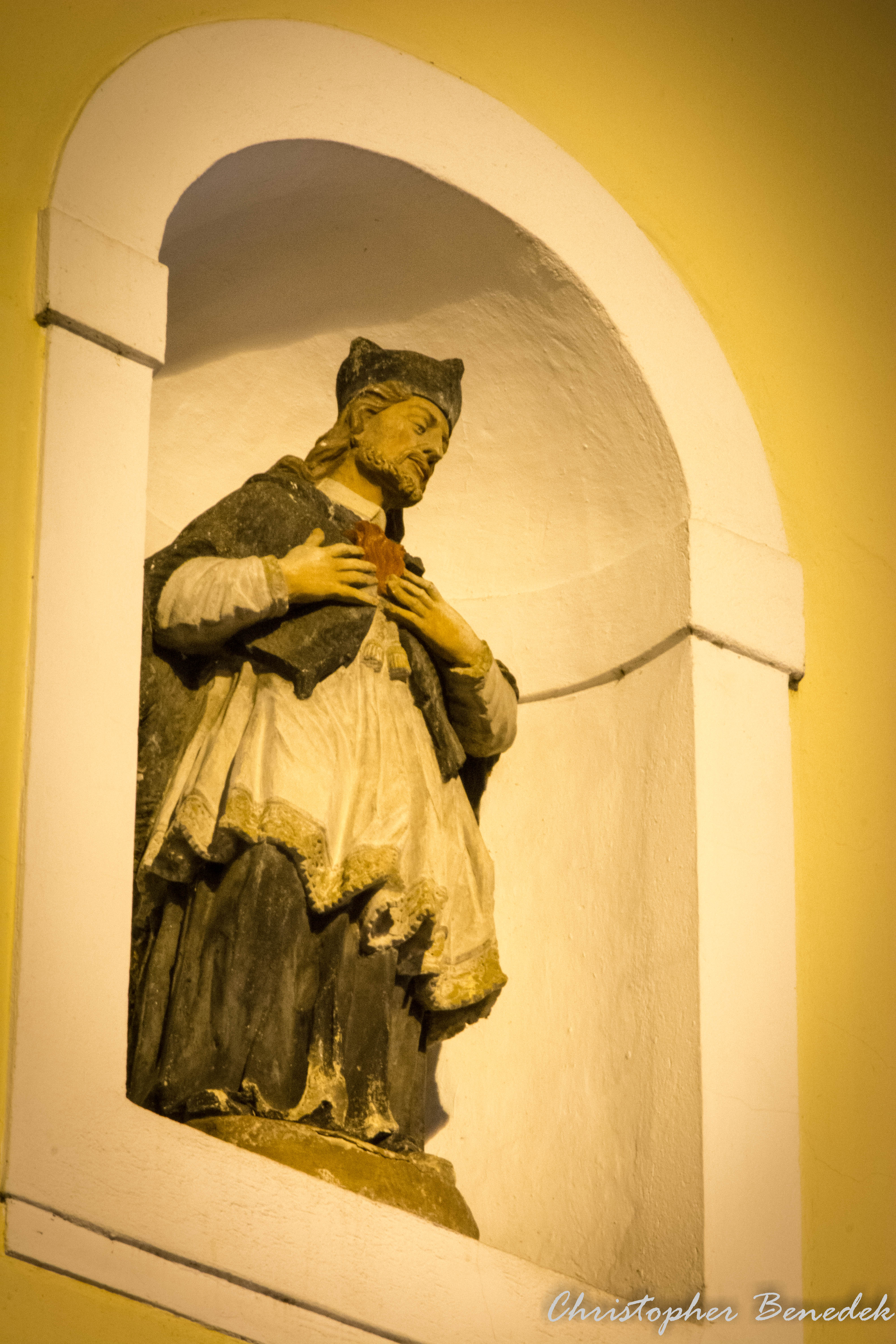 Nepumuki Szent János szobra a torony bejárata felett